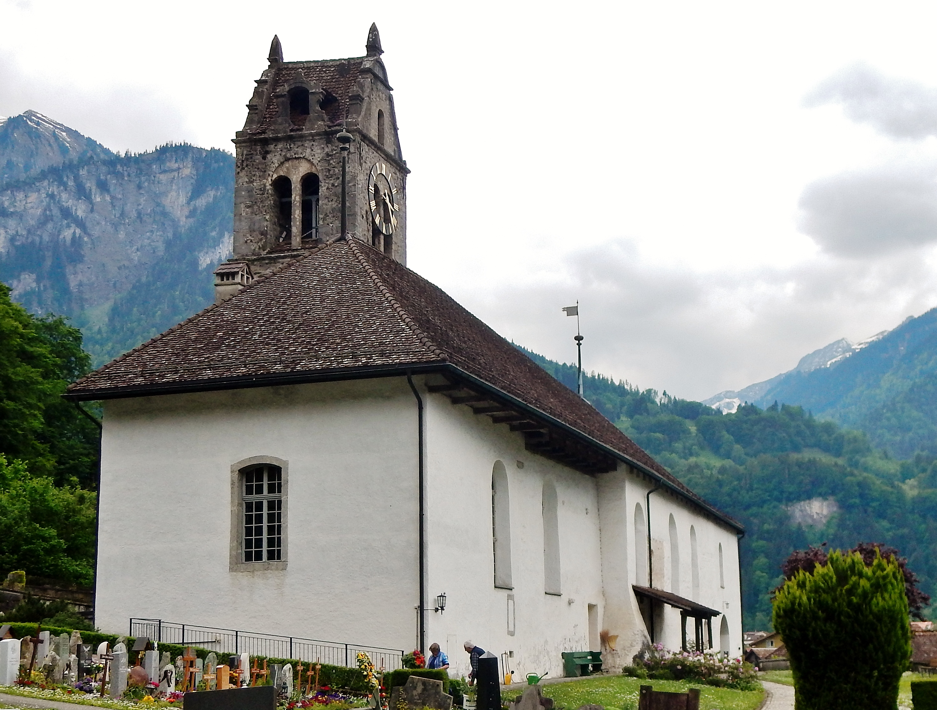 Kirche in Bönigen